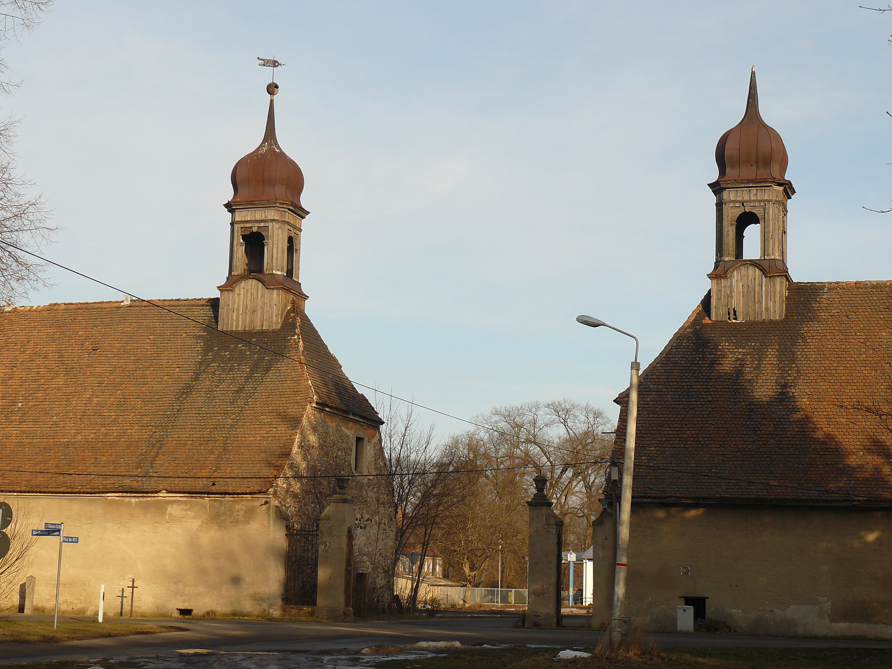 Einfahrt zum ehemaligen Gutshof in Jahmen (Landkreis Görlitz)